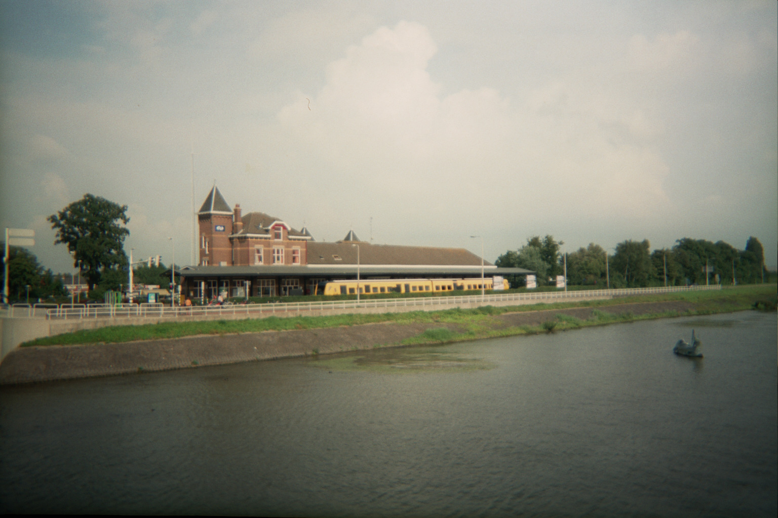 Station Kampen gezien vanaf de 'Stadsbrug'.